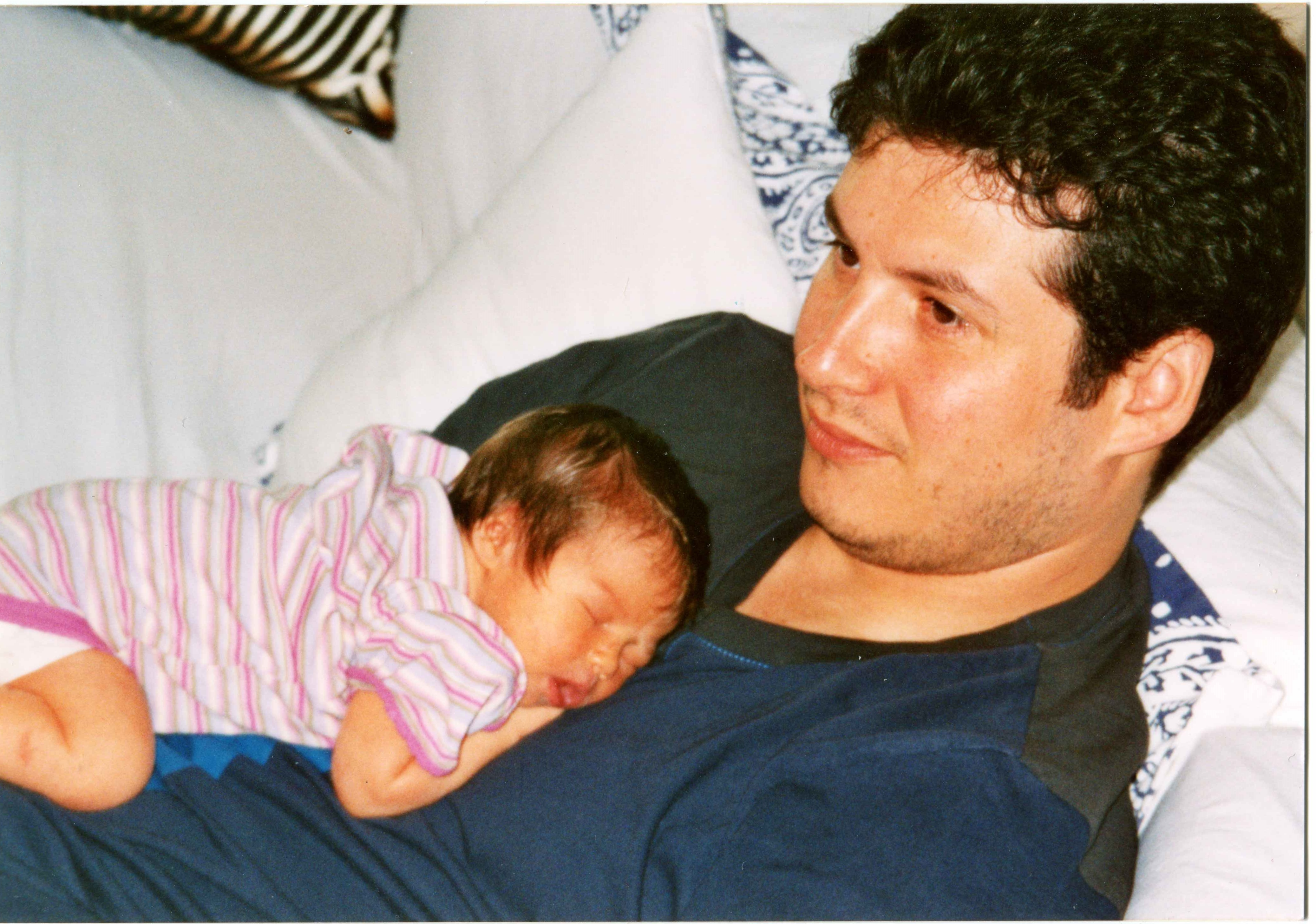 Junger Vater mit kleinem Baby in Berkeley (Oakland)